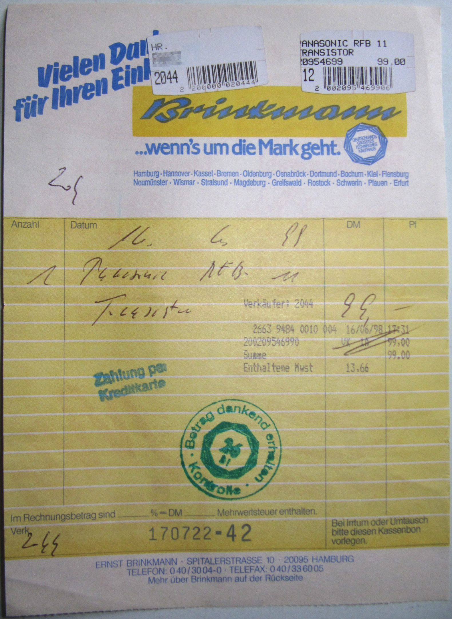 Quittung der 2002 erloschenen Firma Brinkmann in Hamburg über ein Transistorradio (1998)